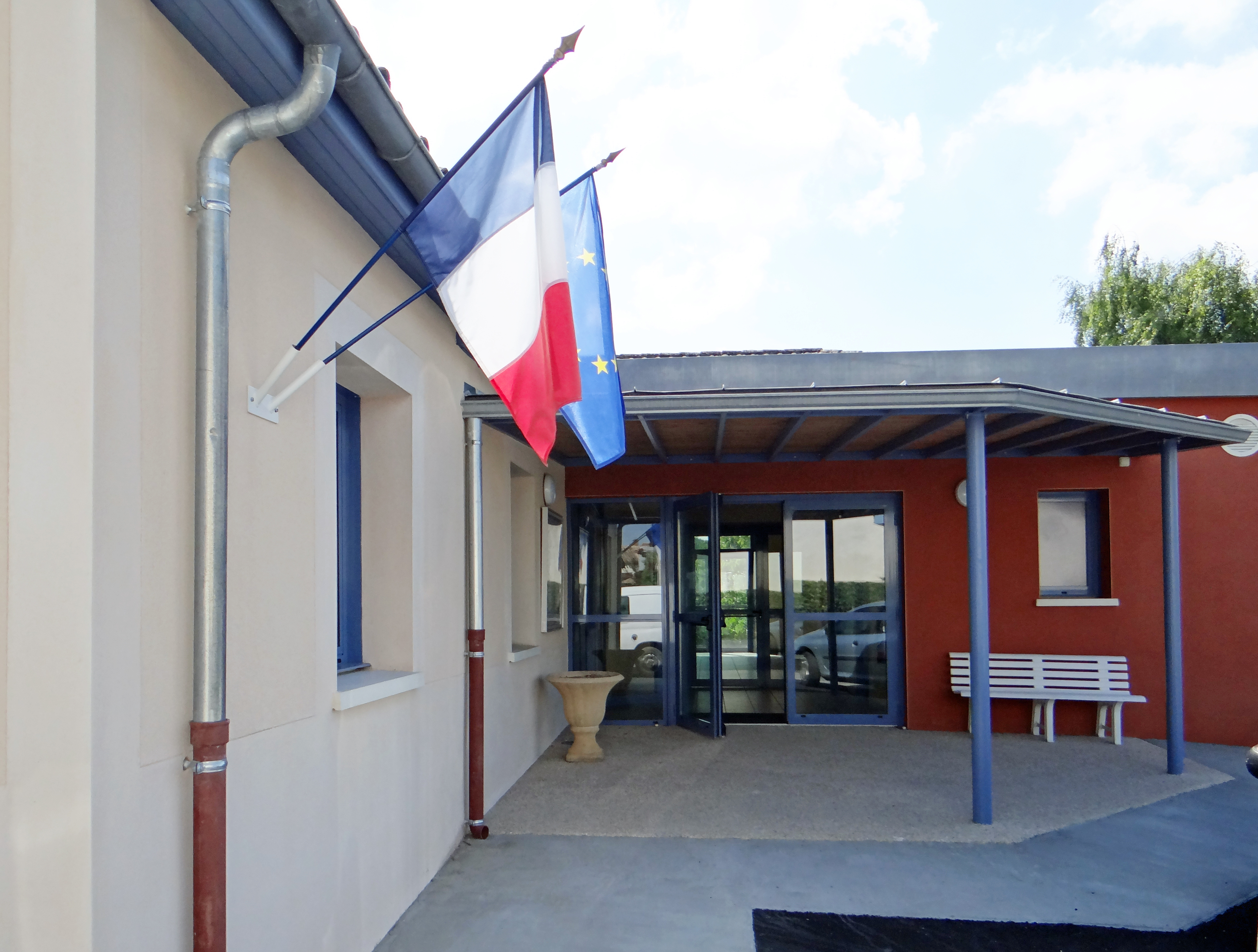 Montaut (Lot-et-Garonne) - Mairie